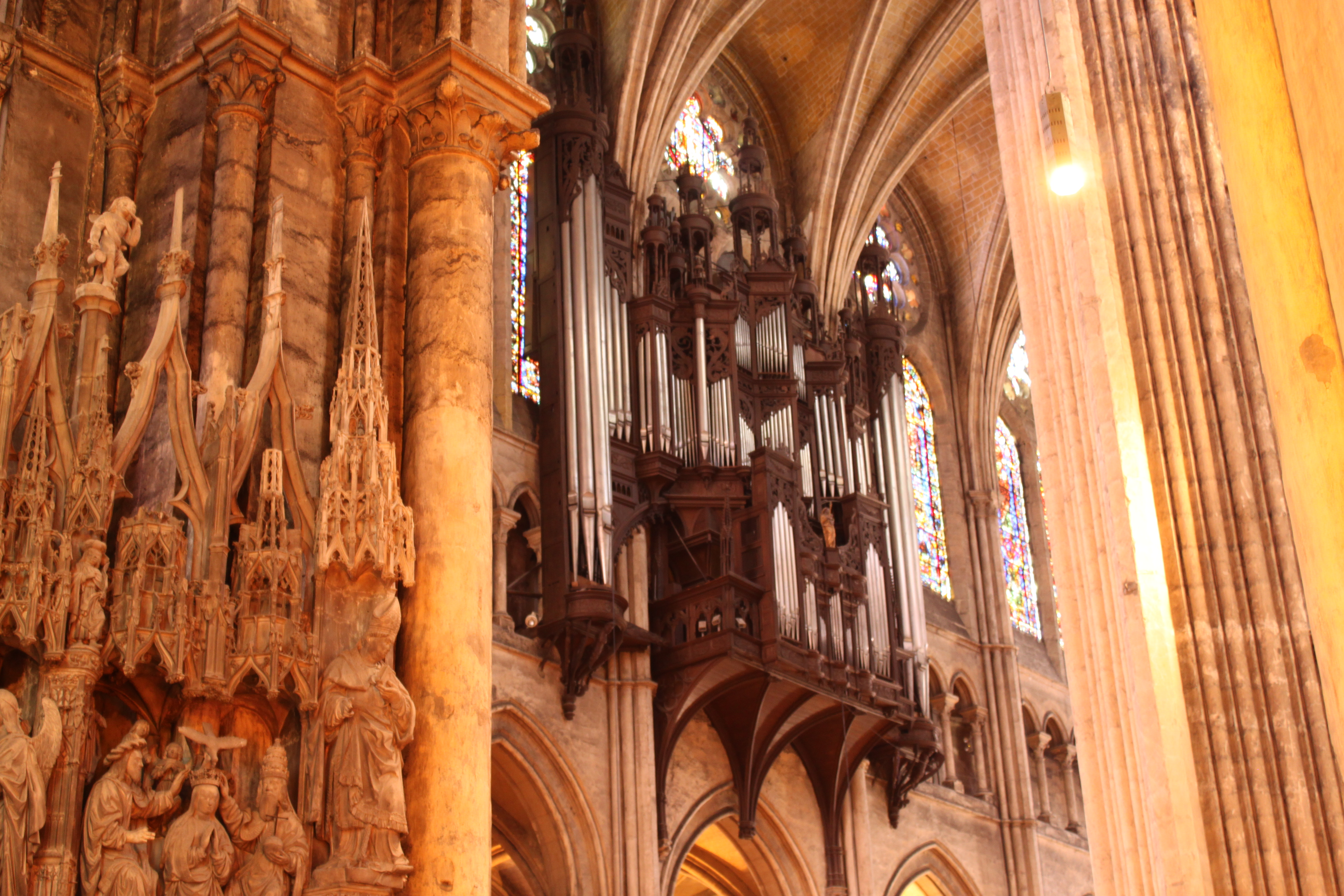 Chartres - Cathédrale Notre Dame: Innenausstattung Orgel